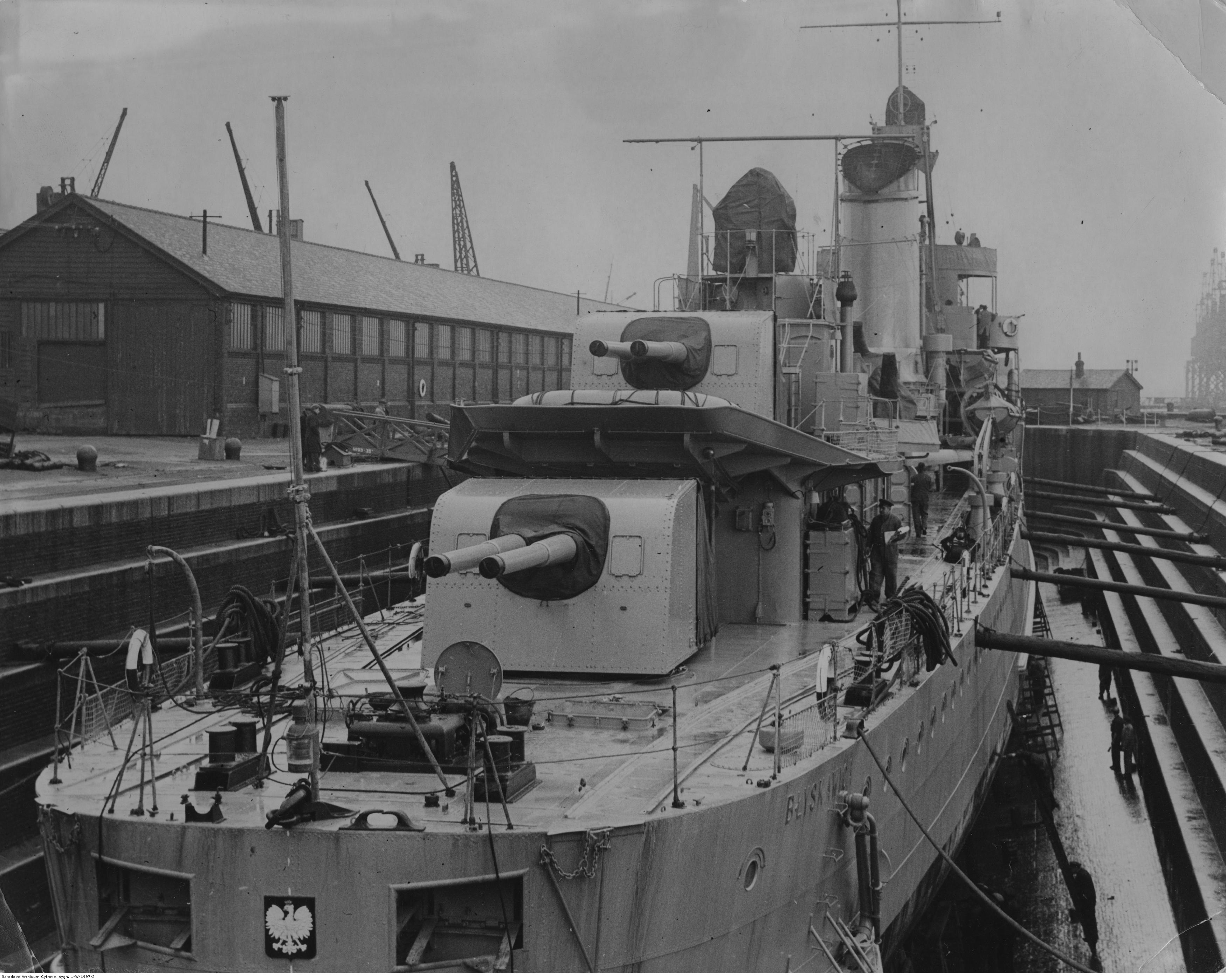 Niszczyciel ORP "Błyskawica" w doku wykończeniowym w Southampton.